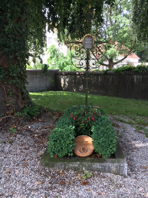 Grabstätte Ferdinand Mirwald